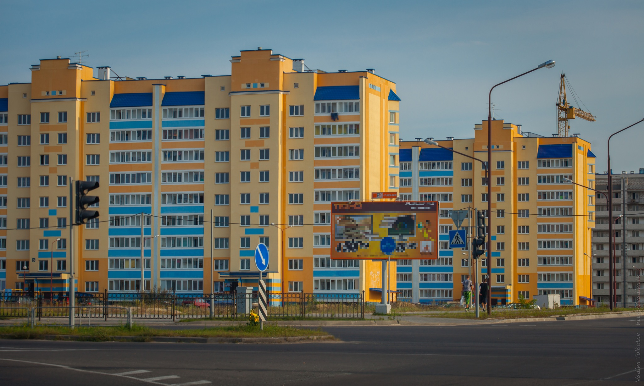 Новые жилые кварталы Бреста